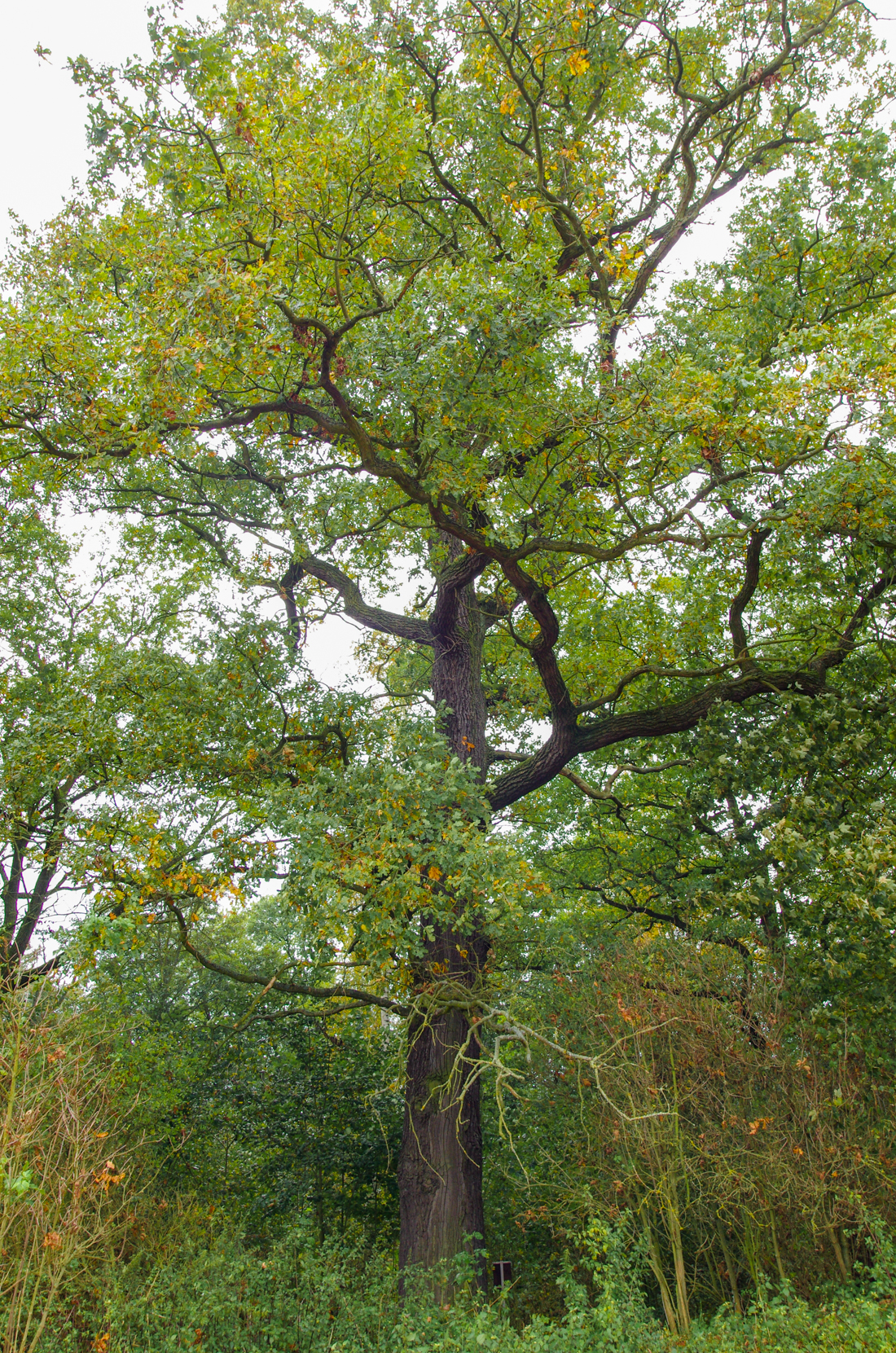 památné stromy - Valdovské duby, okres Cheb